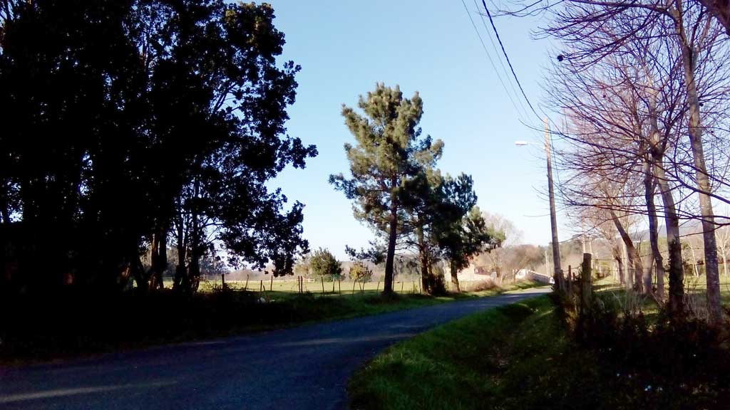 Vista da Pedreira, Sedes.